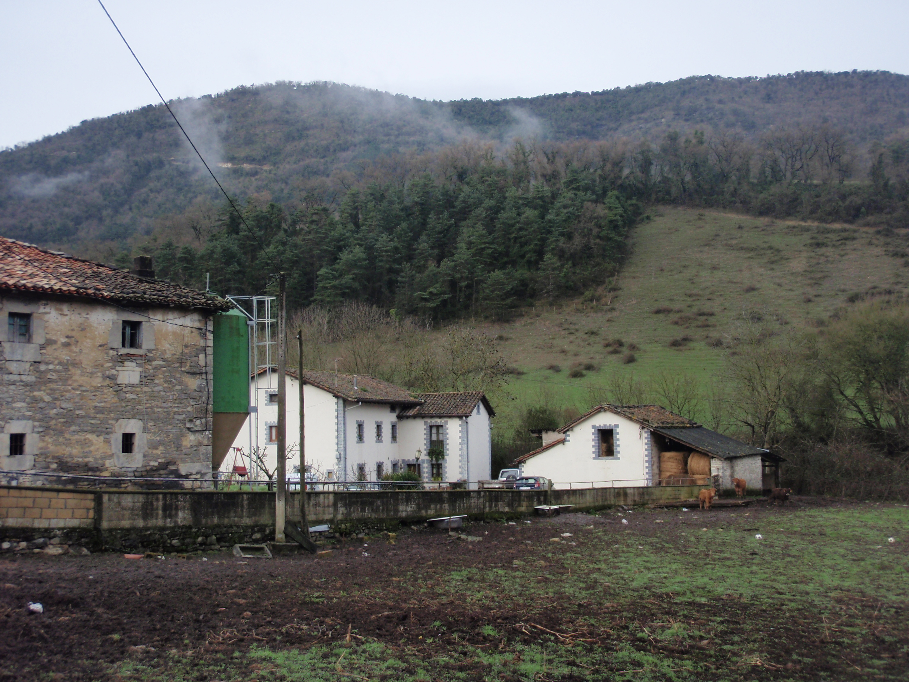 01477 Retes de Llanteno, Araba, Spain